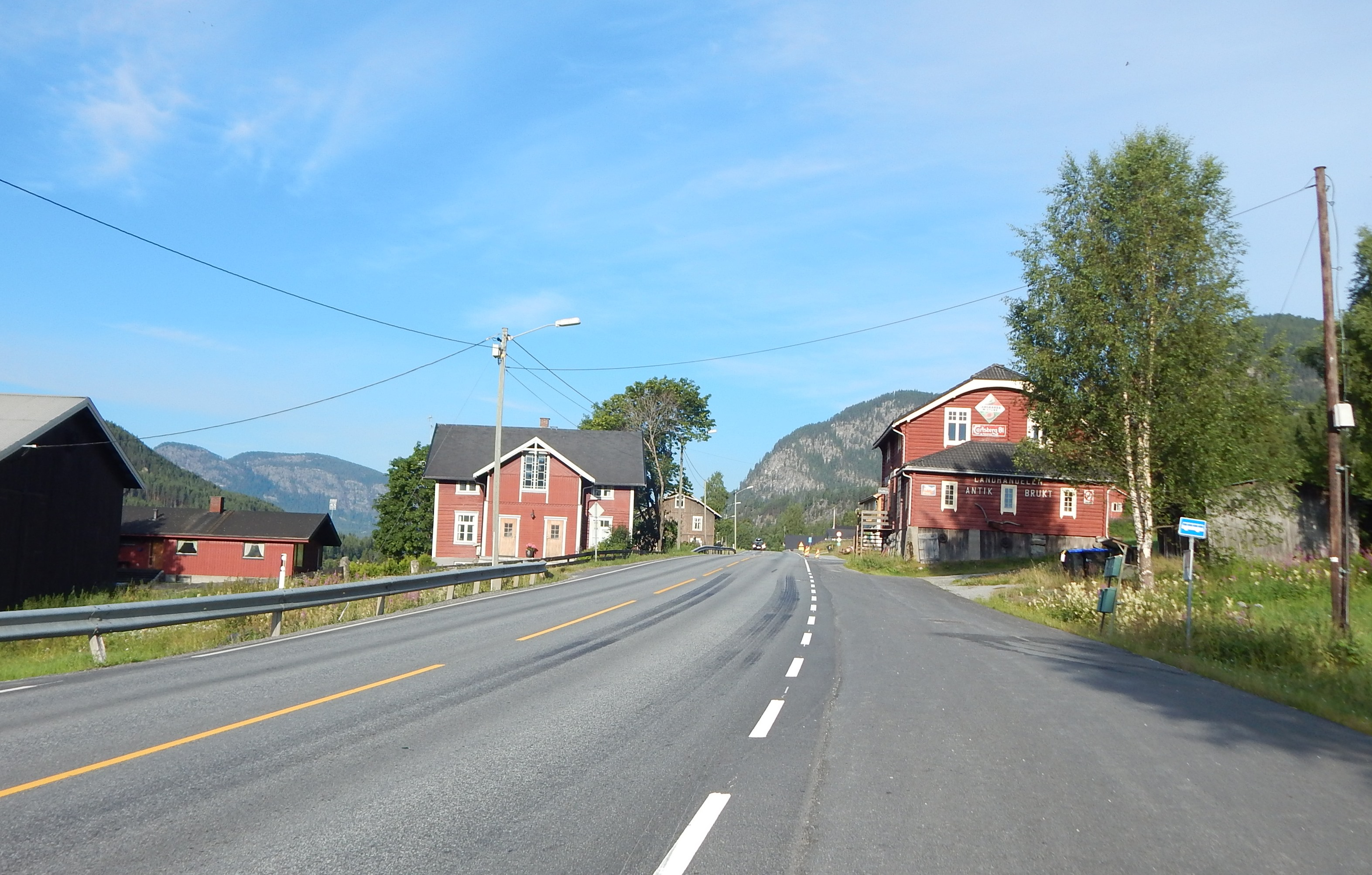 Riksvei 7 ved Rotneim